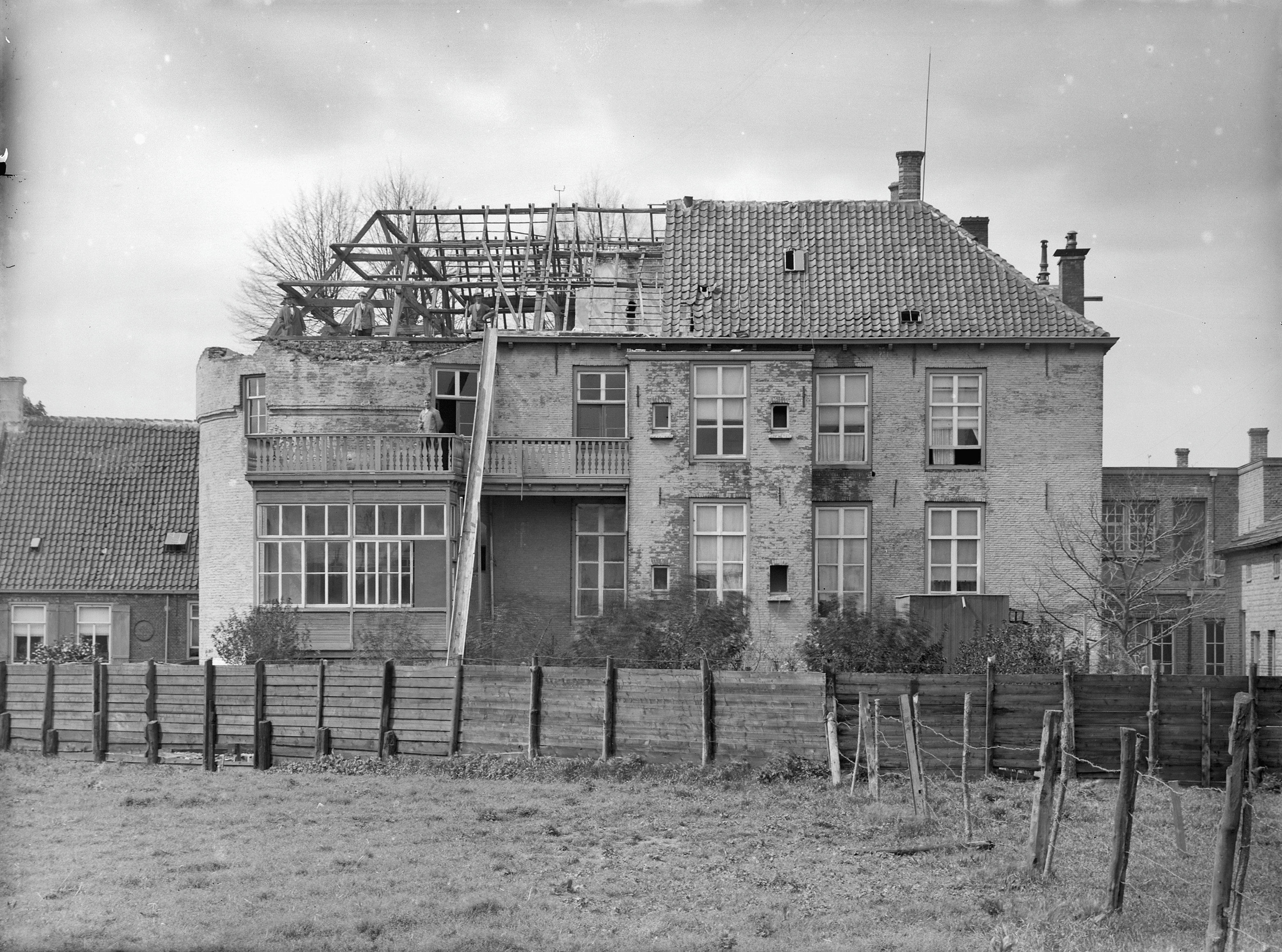 Graafsche Poort: aanzicht